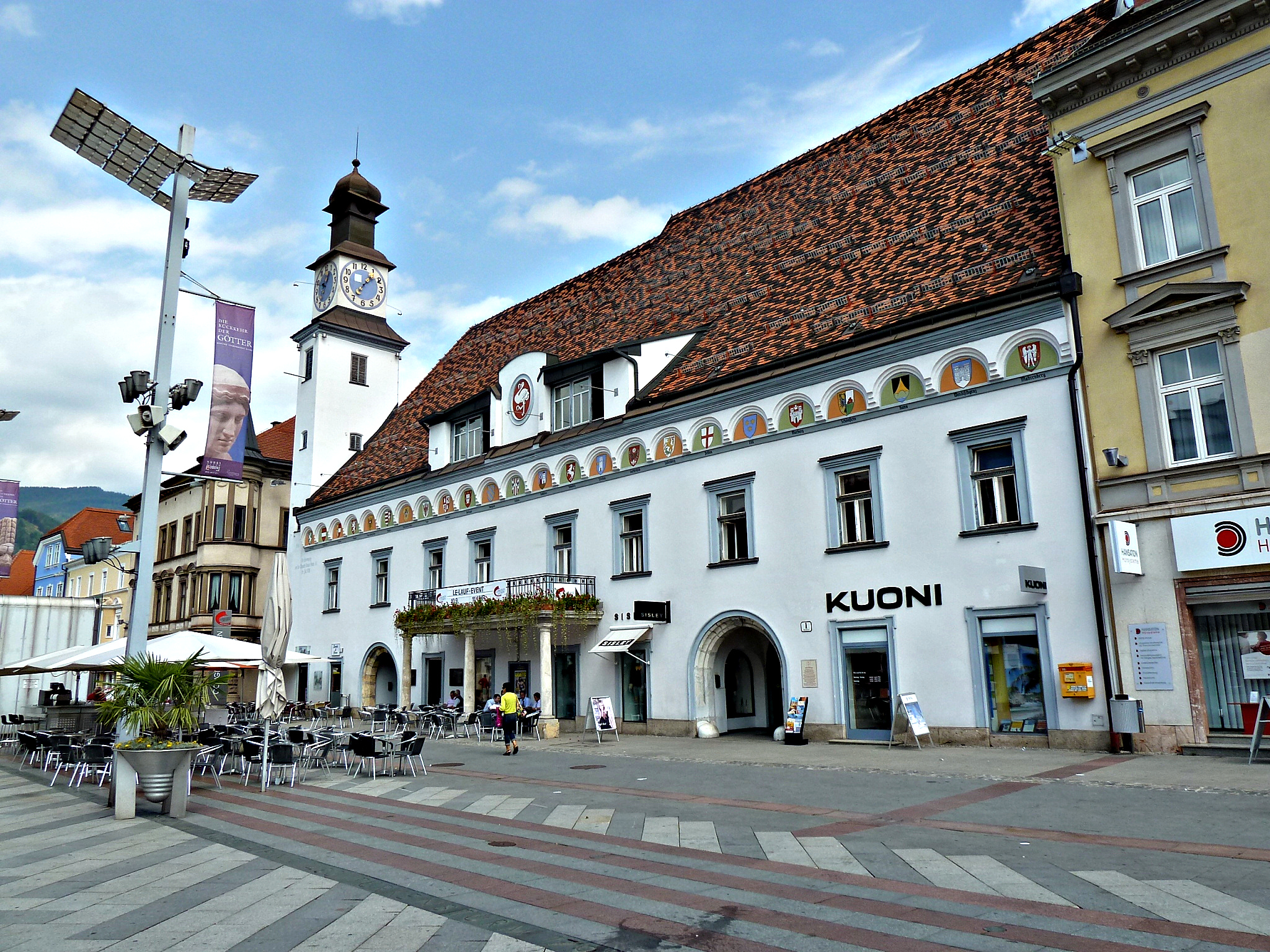 Altes Rathaus